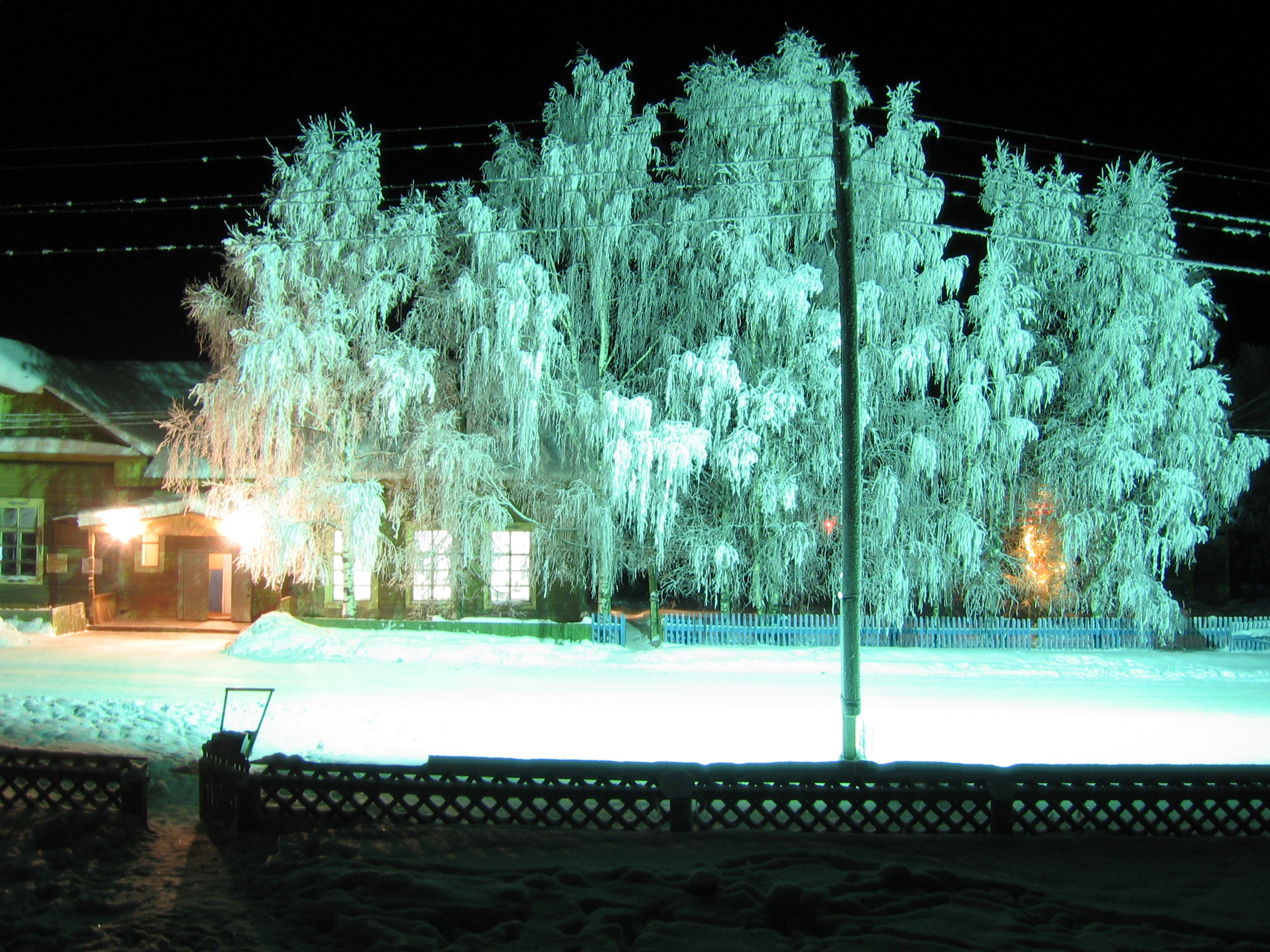 Biserovo in winter